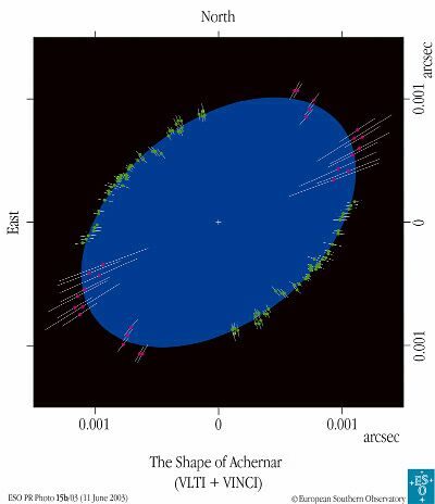 La forma del disco della stella Achernar. Paranal Observatory ESO